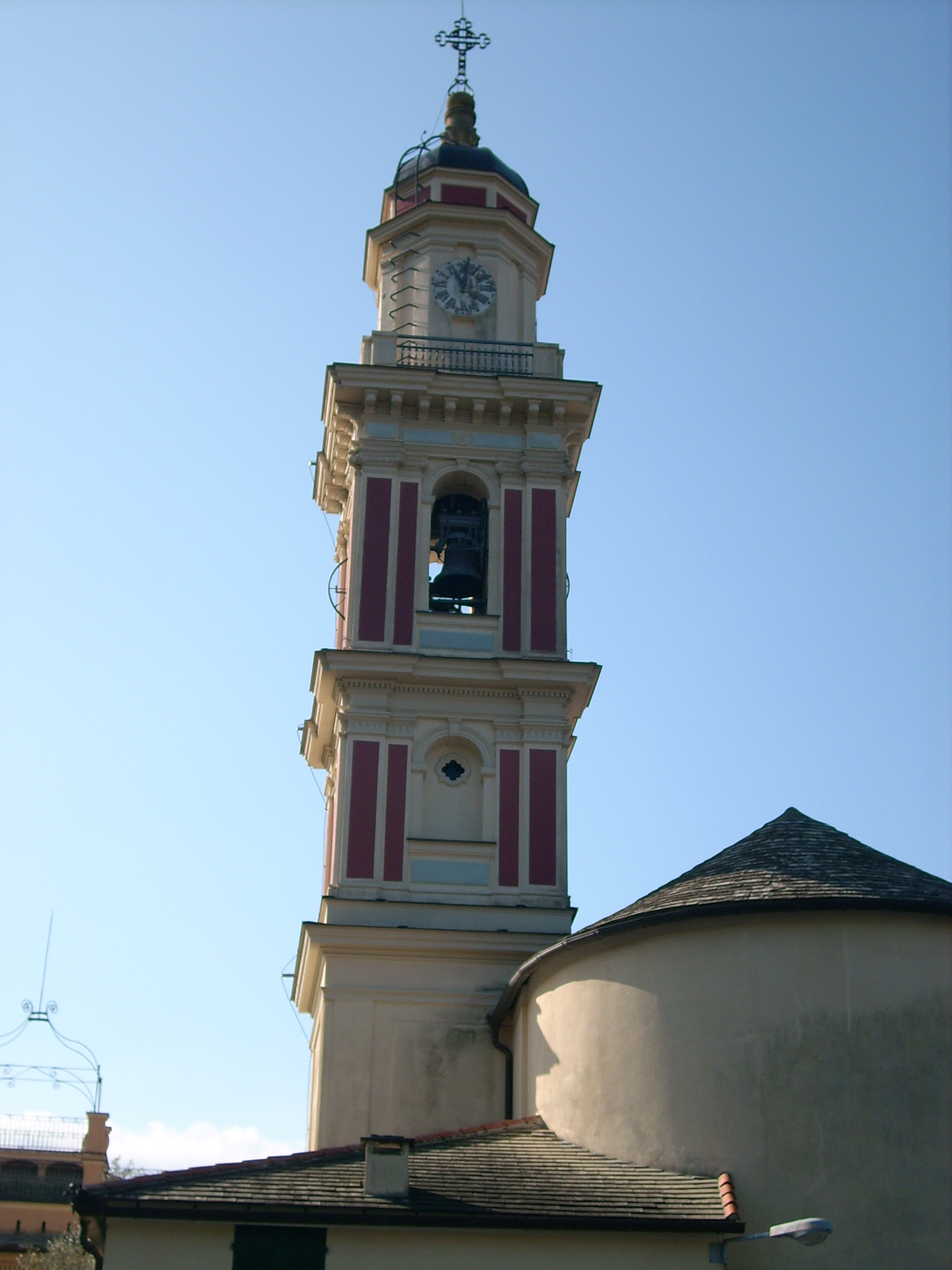 Campanile della chiesa di San Colombano della Costa, Cogorno, Liguria, Italy